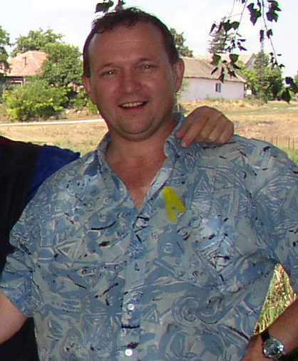 Zoltan Dani